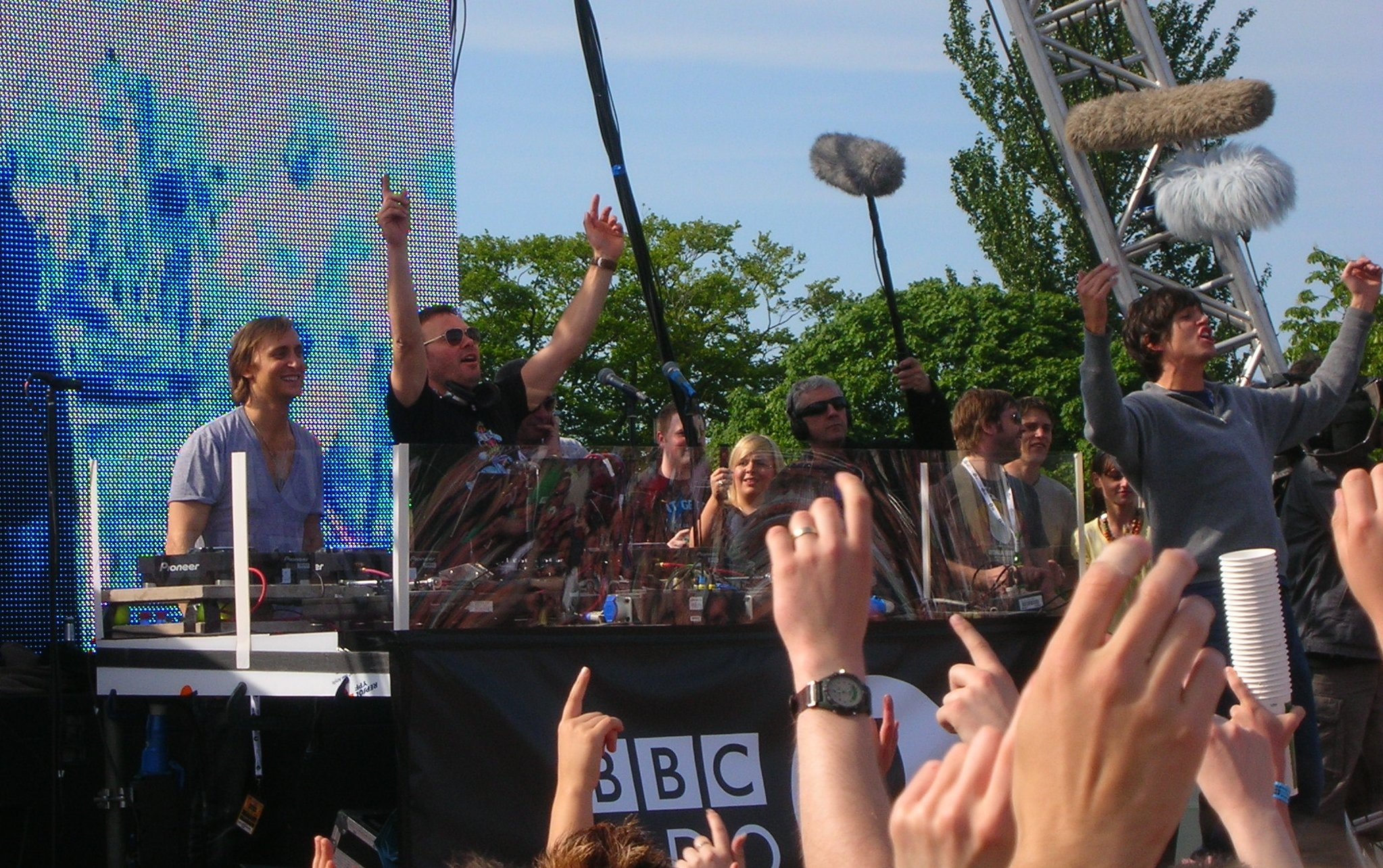 French DJ David Guetta live.